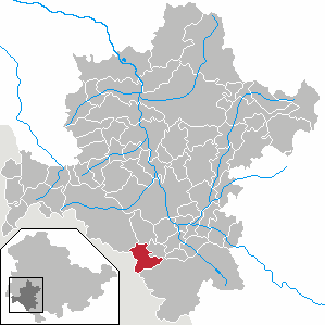 Henneberg in Thuringia - District Schmalkalden-Meiningen